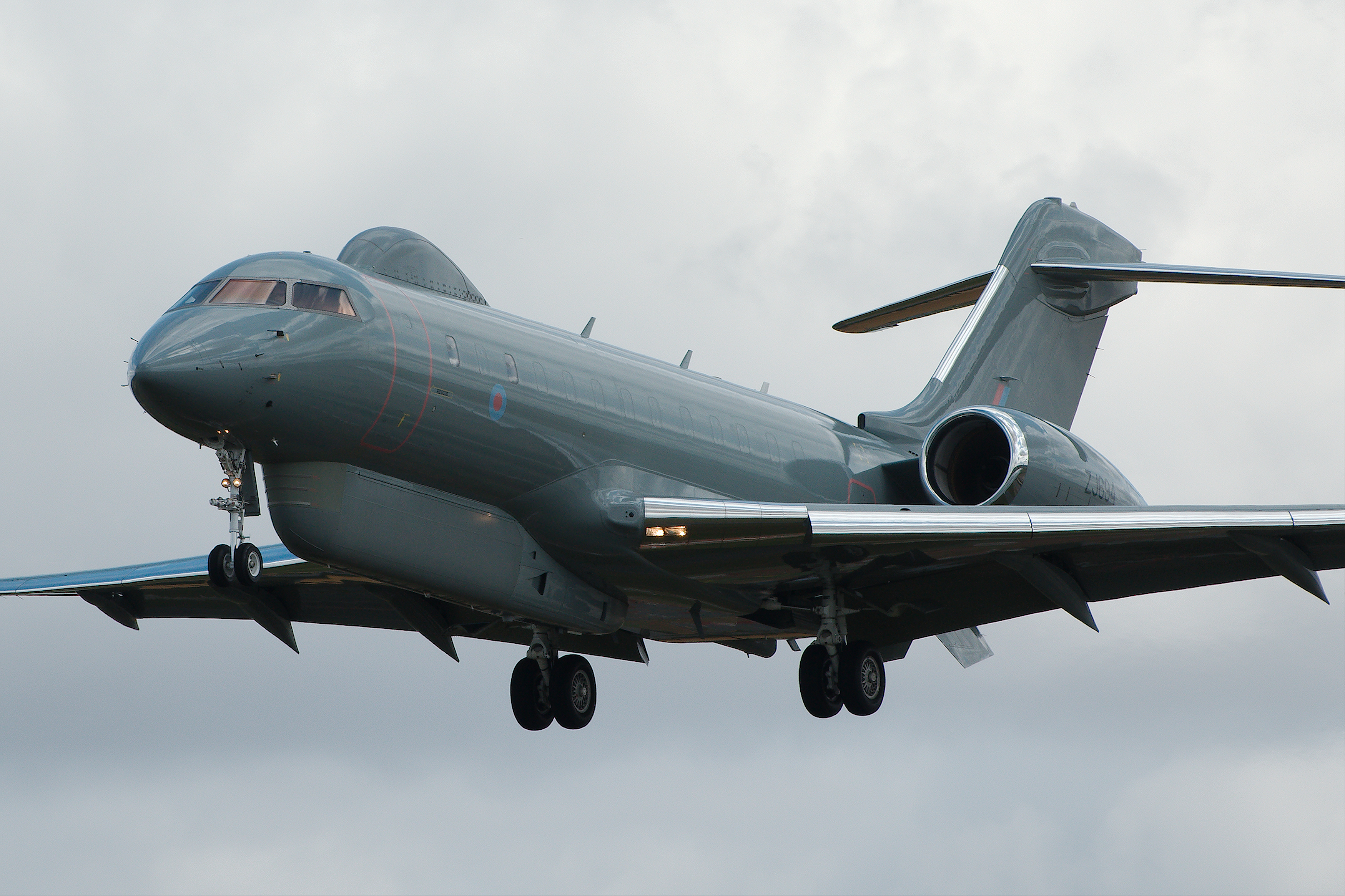 Sentinel - RIAT 2019